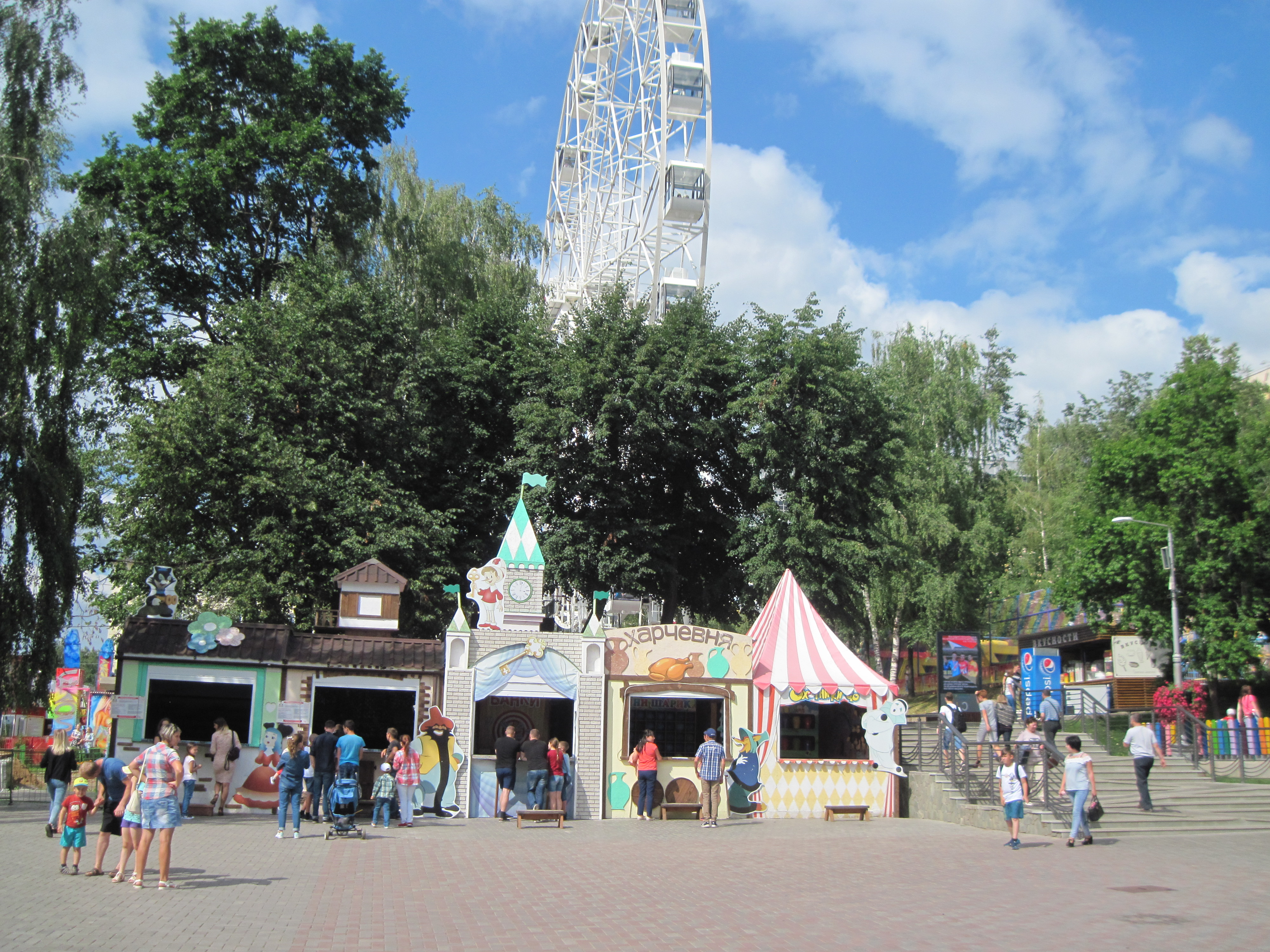 Территория сада